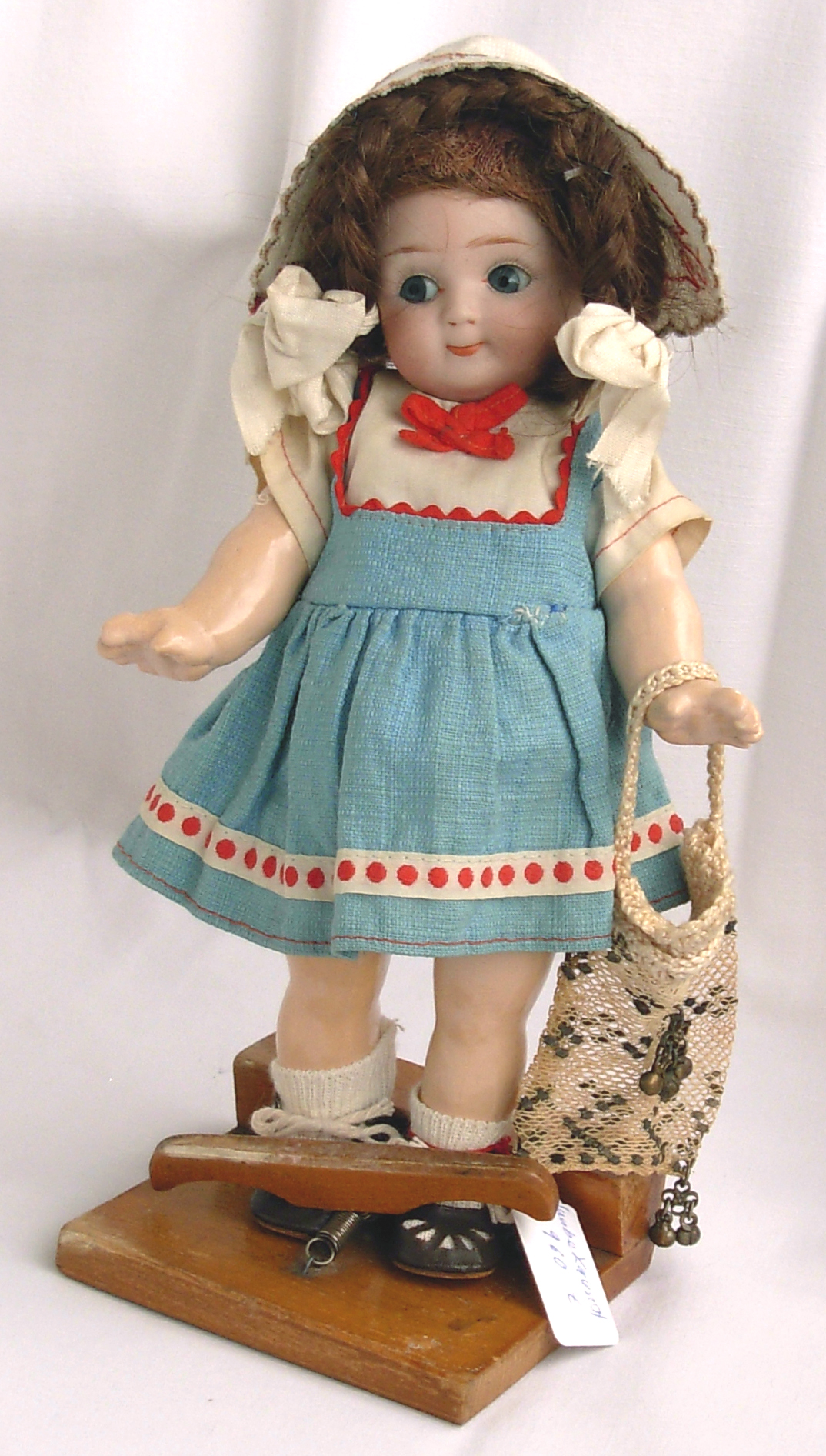 Sogenannte Schielaugenpuppe eines unbekannten Puppenherstellers mit einem Kopf auf Porzellan, der sich an den Marke Kewpi orientiert - hier auf einem Gliederkörper aus Masse ...